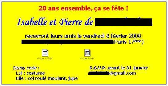 Scan de l'invitation